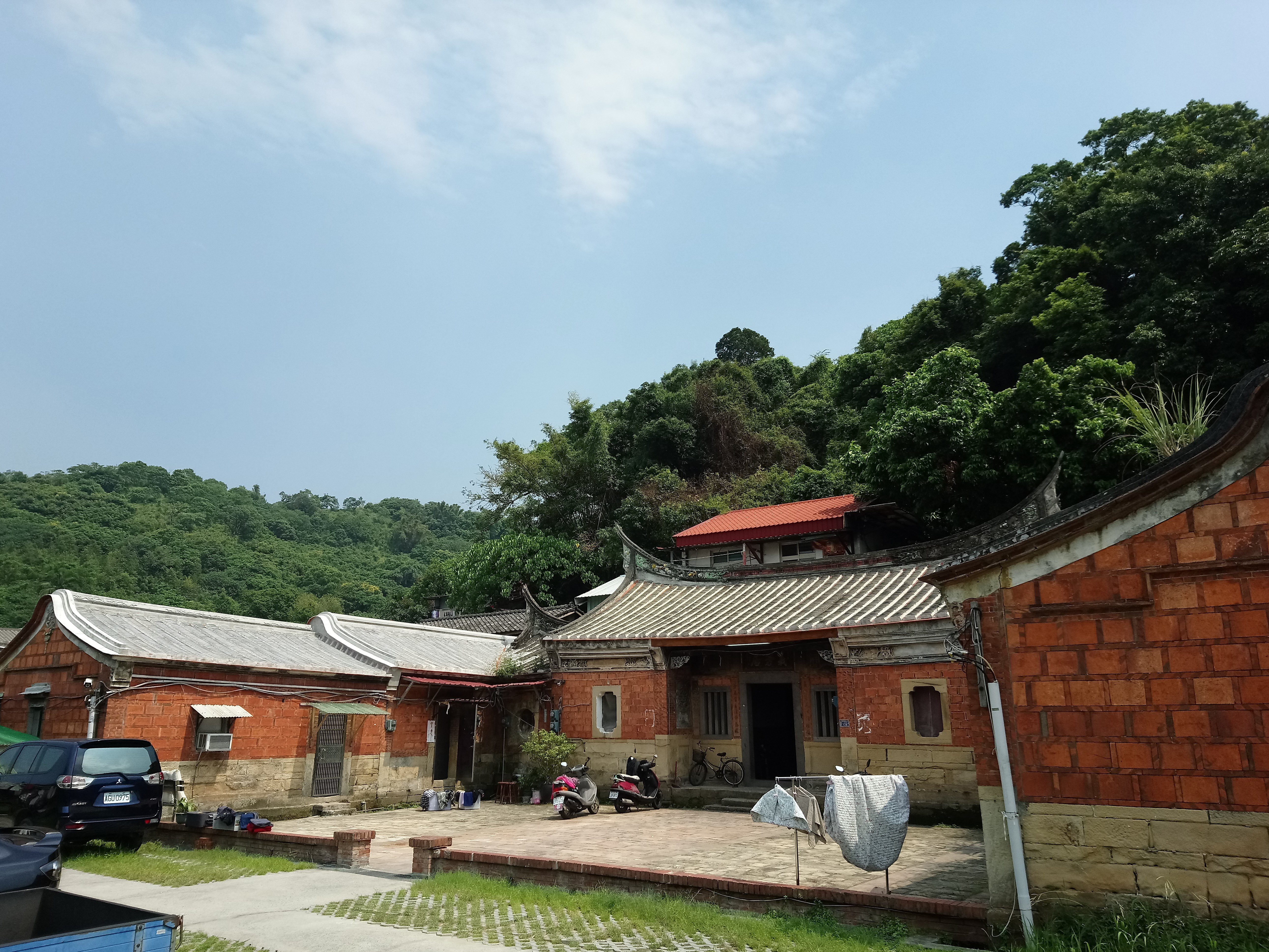 義芳居古厝,臺北市大安區學府次分區學府里